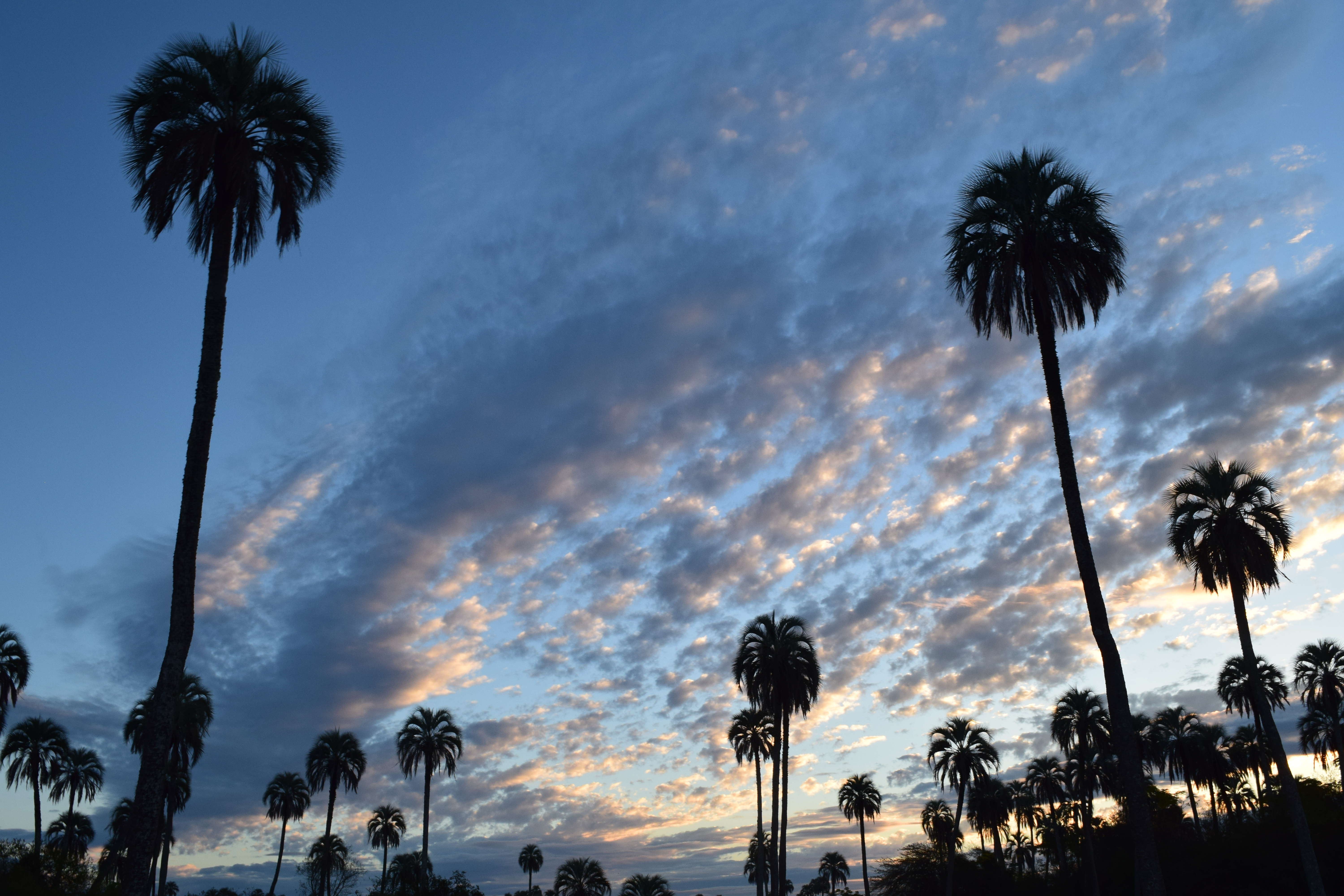 Atardecer en el Parque Nacional El Palamar, en la provincia de Entre Ríos.